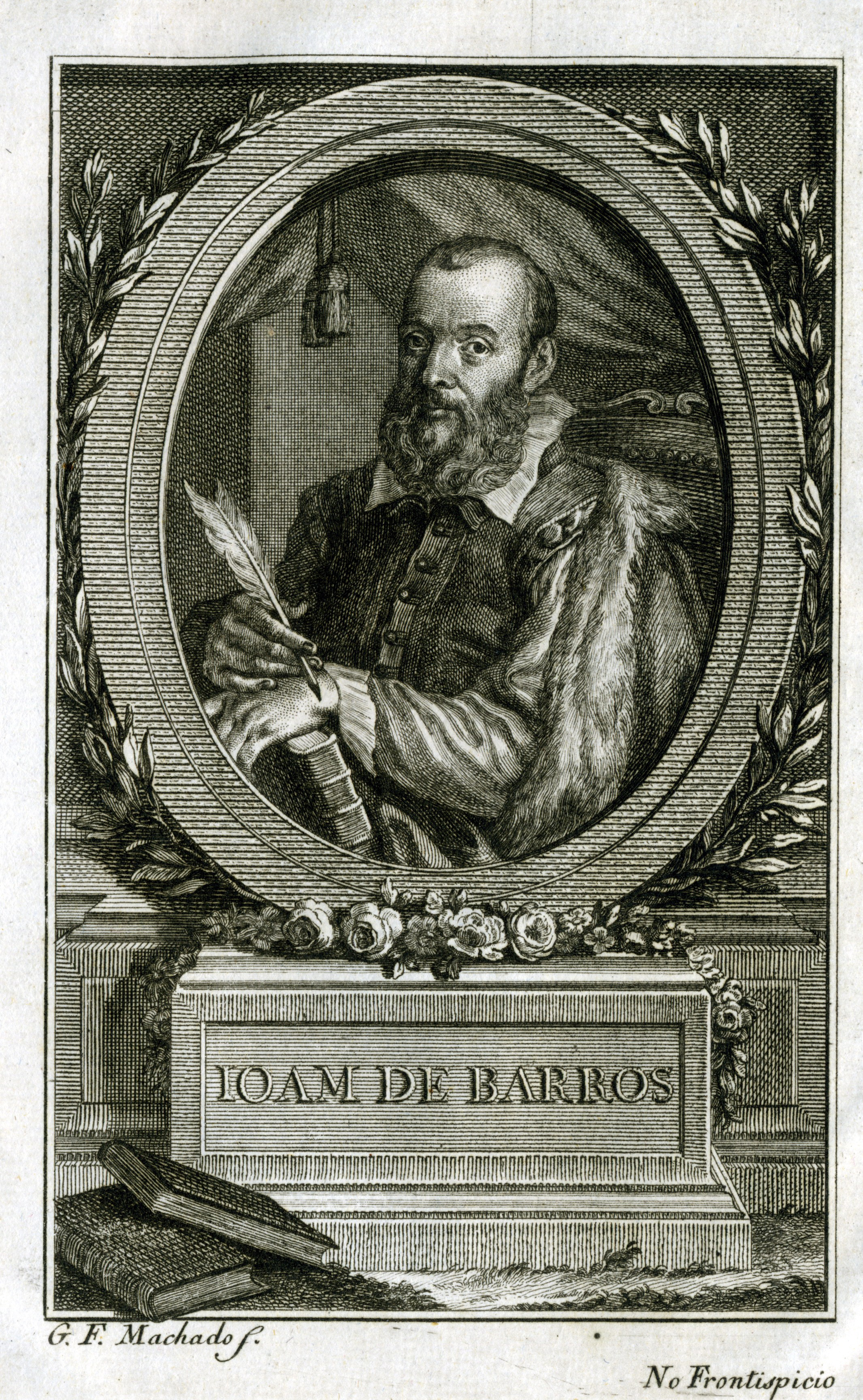 portrait de João de Barros, in Décadas da Ásia, Lisboa 1777-1778